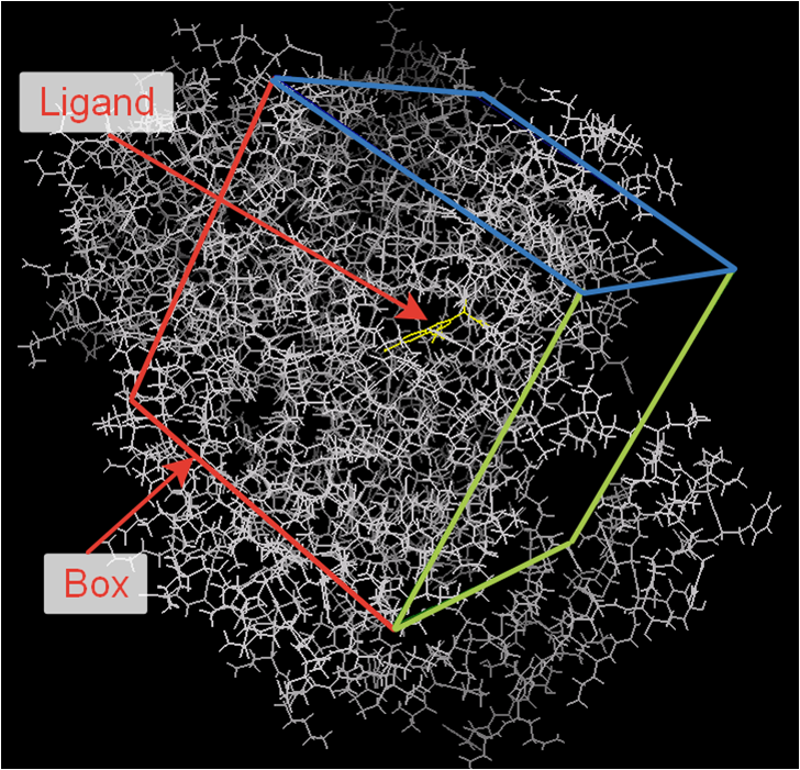 Кубическая область, в которую проводится докинг. Оласть захватывает активный центр белка 3NTB. Здесь в центре желтым обозначен лиганд T1N.